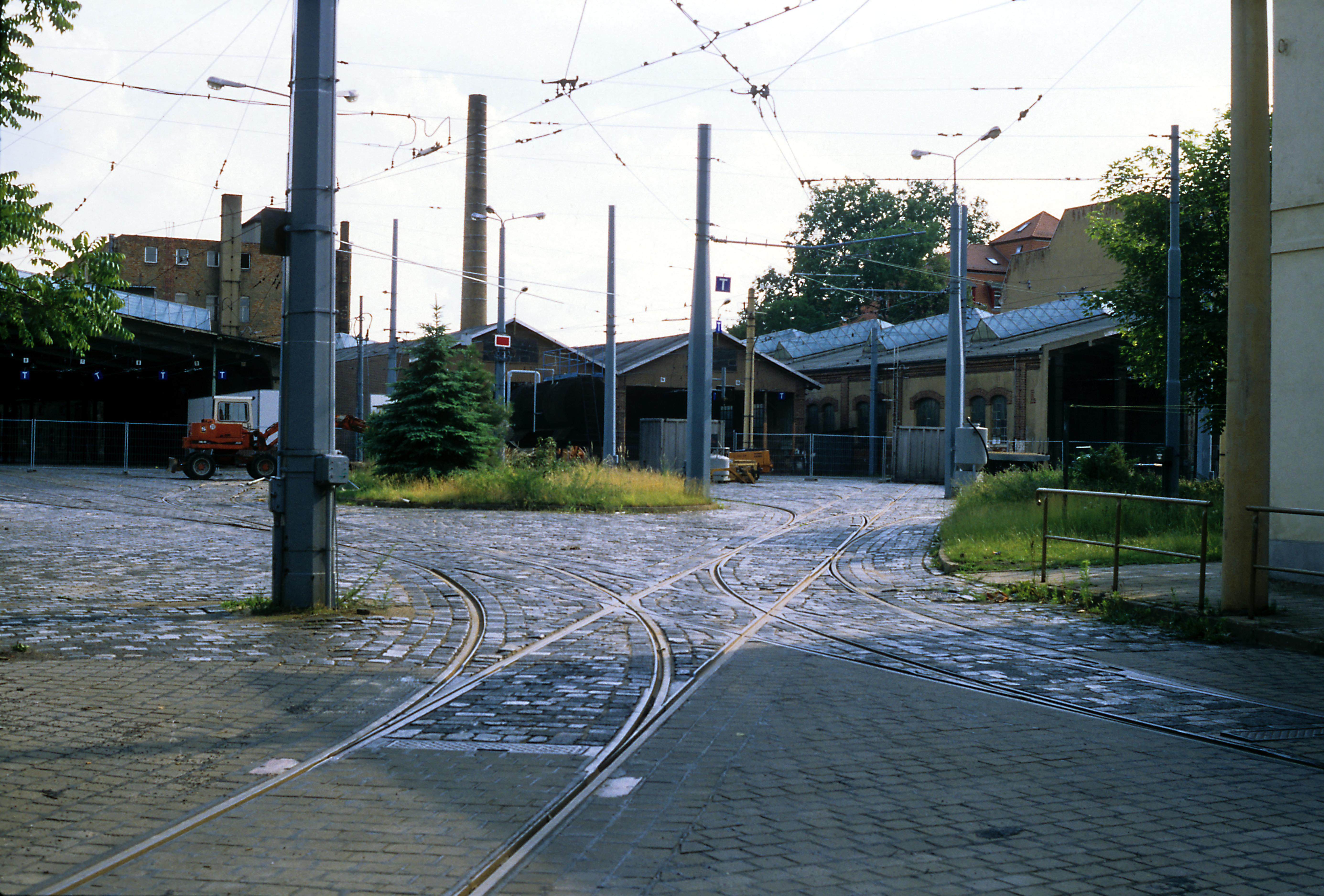 Östliche Einfahrt von der Dresdner Straße, von rechts nach links mit Blich auf die Hallen A, B und C. Die Halle B besteht aus zwei Teilen, die linke Hälfte steht am Ort der ersten Wagenhalle der Leipziger Pferdeeisenbahn. Die doppelte Kreuzungsweiche mit außenliegenden Zungen im Vordergrund ist eine der ganz wenigen im Leipziger Straßenbahnnetz, möglicherweise war es die letzte. Das Bw ist zum Aufnahmezeitpunkt schon einige Zeit außer Betrieb, in der Folge wird es trotz Denkmalschutz abgebrochen und durch ein Einkaufszentrum ersetzt.